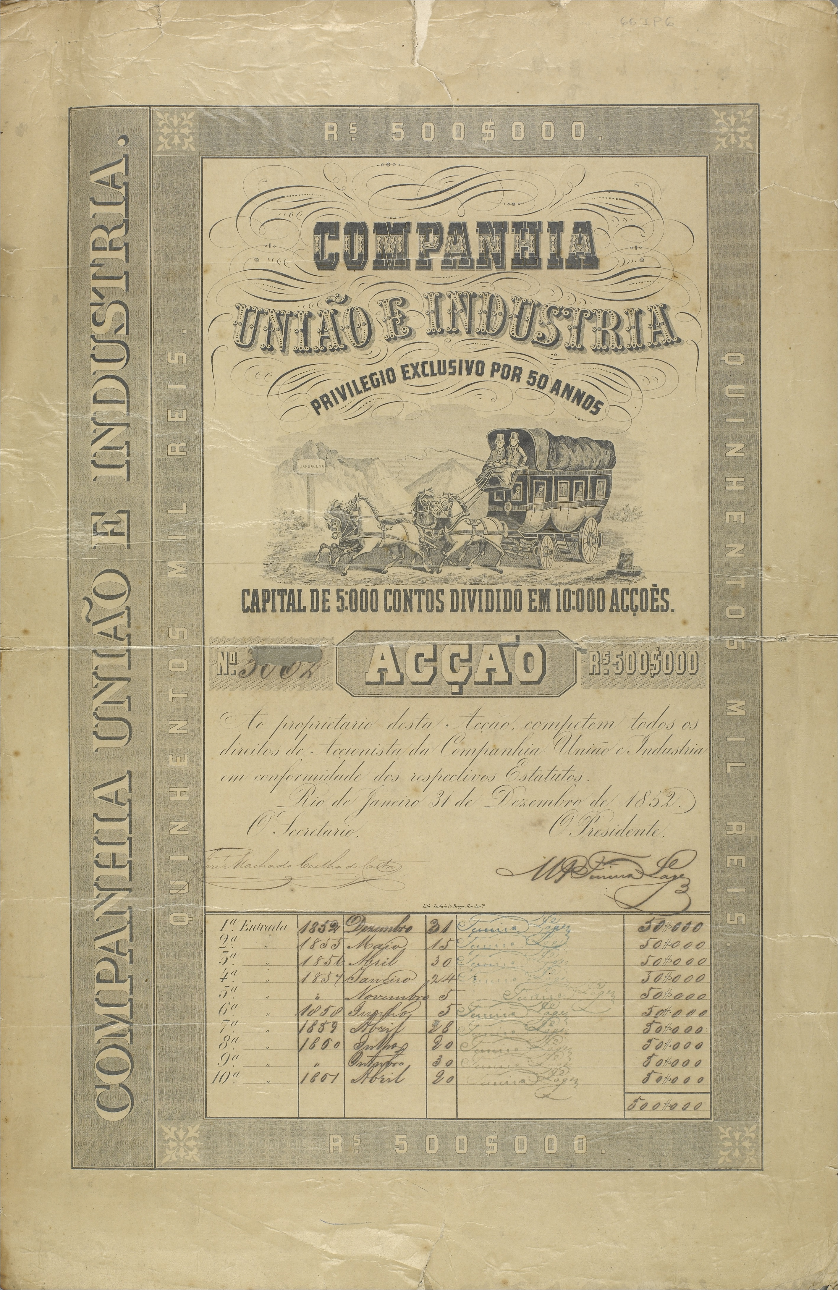 Ação da Companhia União e Indústria no valor de 500$000 réis. Fundo Diversos Códices – SDH.